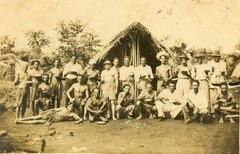 garimpeirospovos